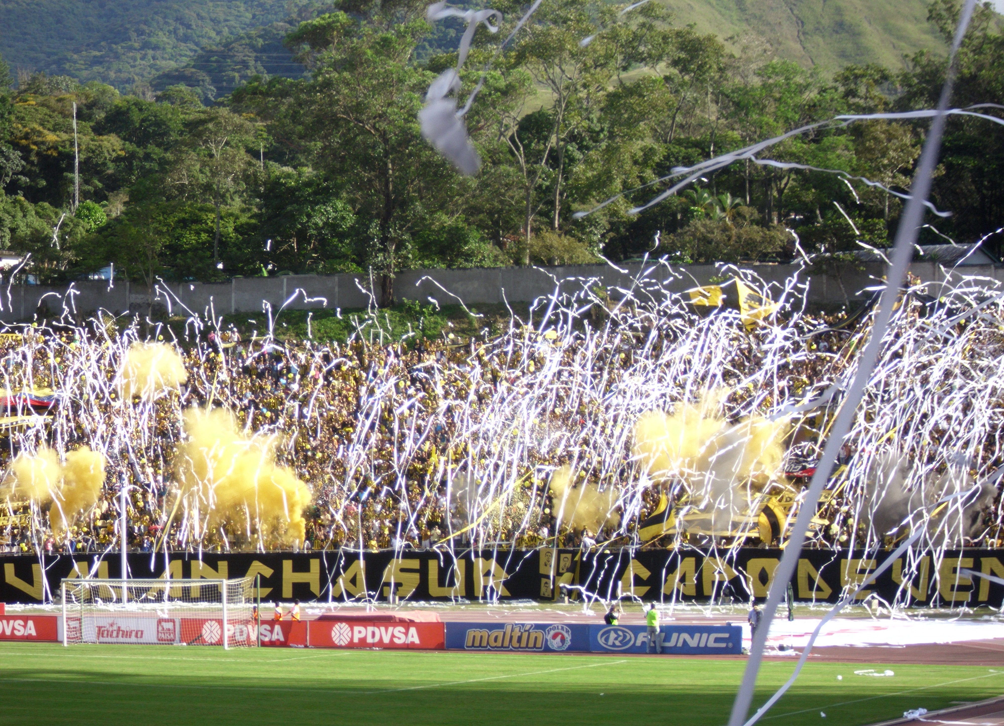 La Avalancha Sur en el enfrentamiento entre el Deportivo Táchira y el Real Esppor por la penúltima fecha del Torneo Apertura 2010.